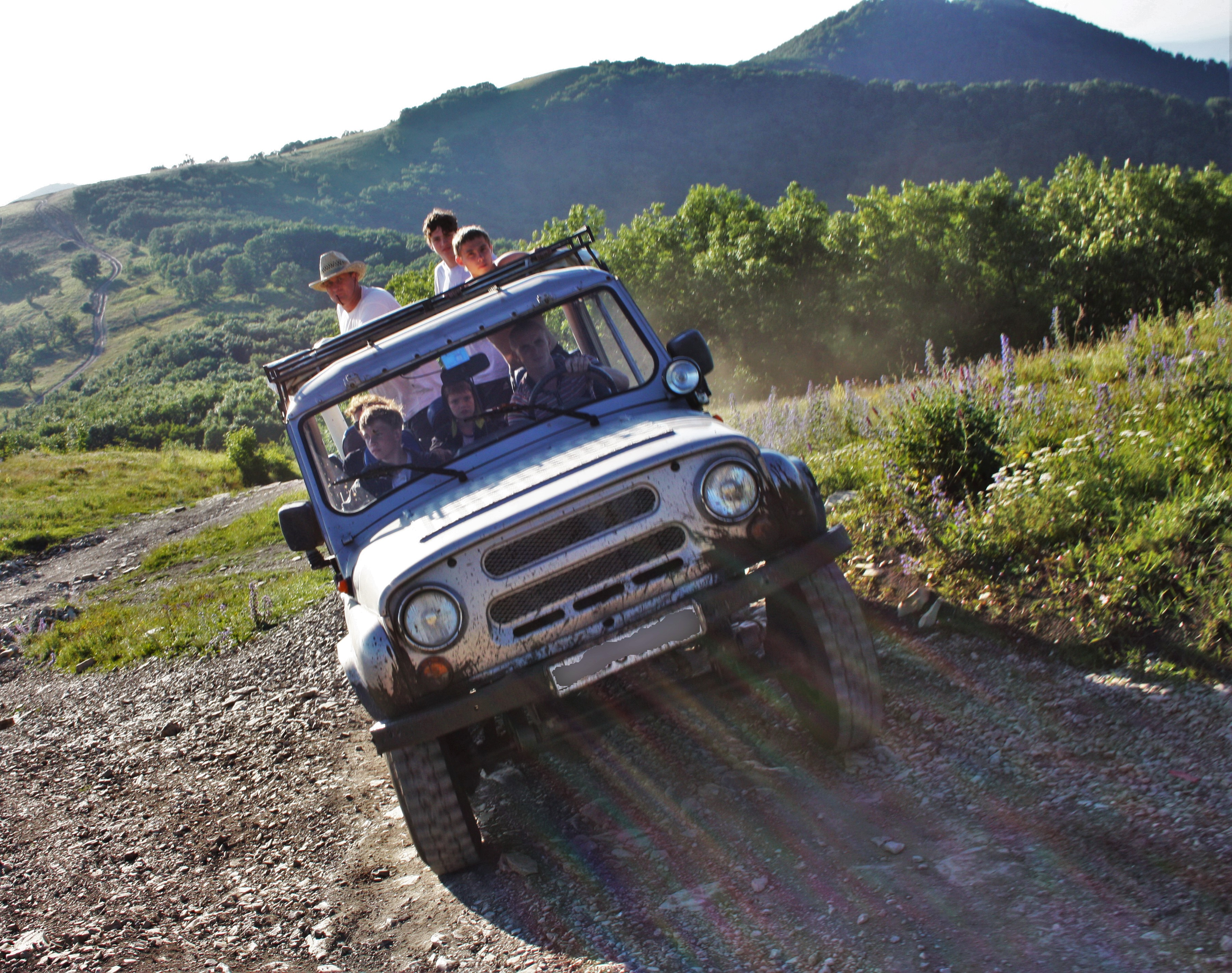 Джиппинг